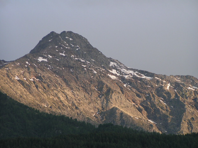 pizzo forno 2 - Foto fatta da Elvezio